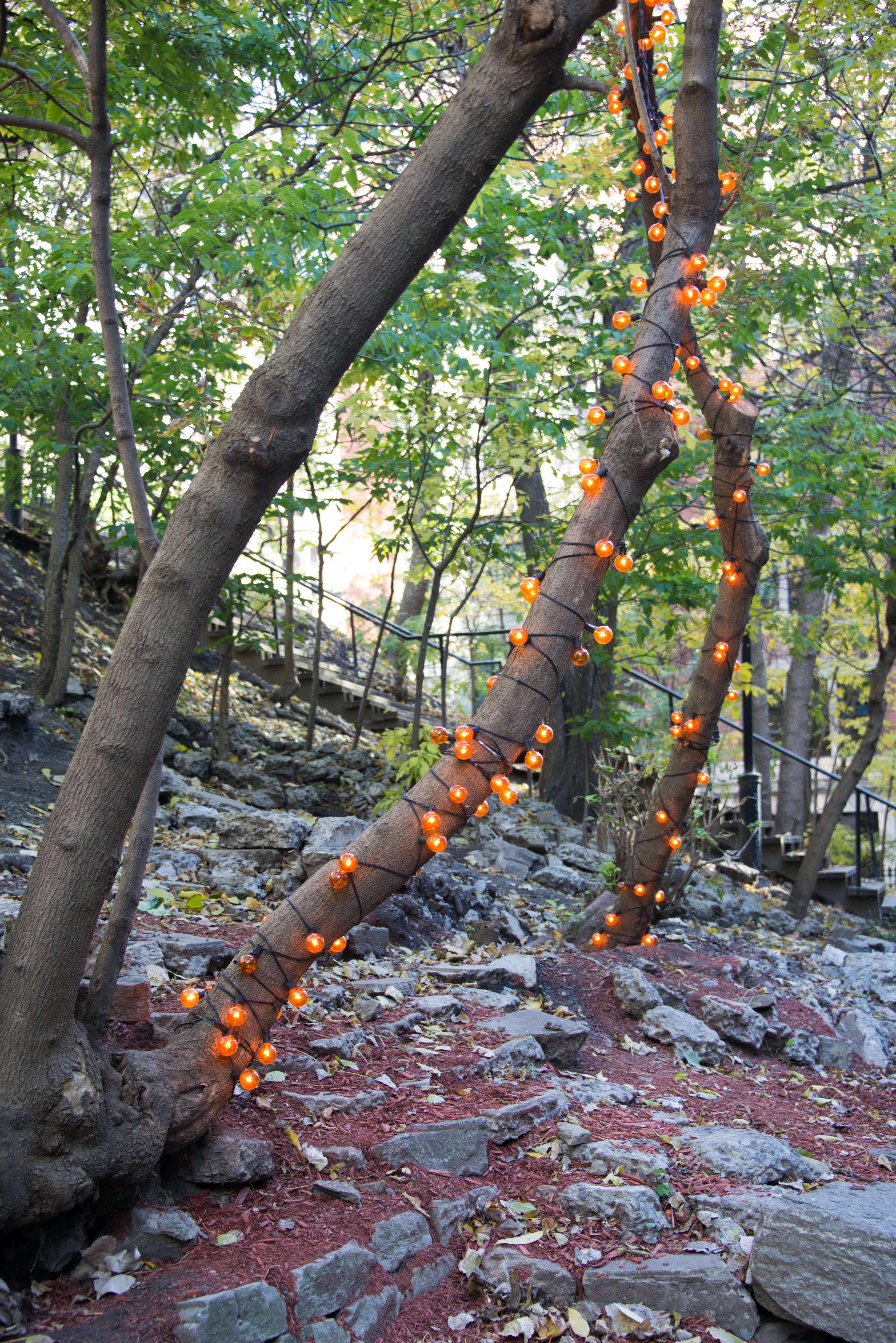 Montréal, le jardin de la basilique Saint-Patrick Histoire revenue est une installation sonore et lumineuse in situ qui s'inspire de la vie de l'esclave noire Marie Josèphe Angélique reconnue coupable en 1734 d'avoir mis le feu à la maison de sa maîtresse et provoquant ainsi l'incendie ayant réduit en cendres la majeure partie du quartier marchand de la rue Saint-Paul à Montréal. Un incendie pour lequel Marie Josèphe a été torturée, condamnée et pendue le 21 juin de la même année. Utilisant le son, la lumière, des matériaux naturels et le décor même du site, les terrains de la basilique de Saint-Patrick, l'œuvre tend à rappeler la réalité de l'esclavage au Québec et soulève ainsi des questions sur le pouvoir et le droit de se faire entendre.